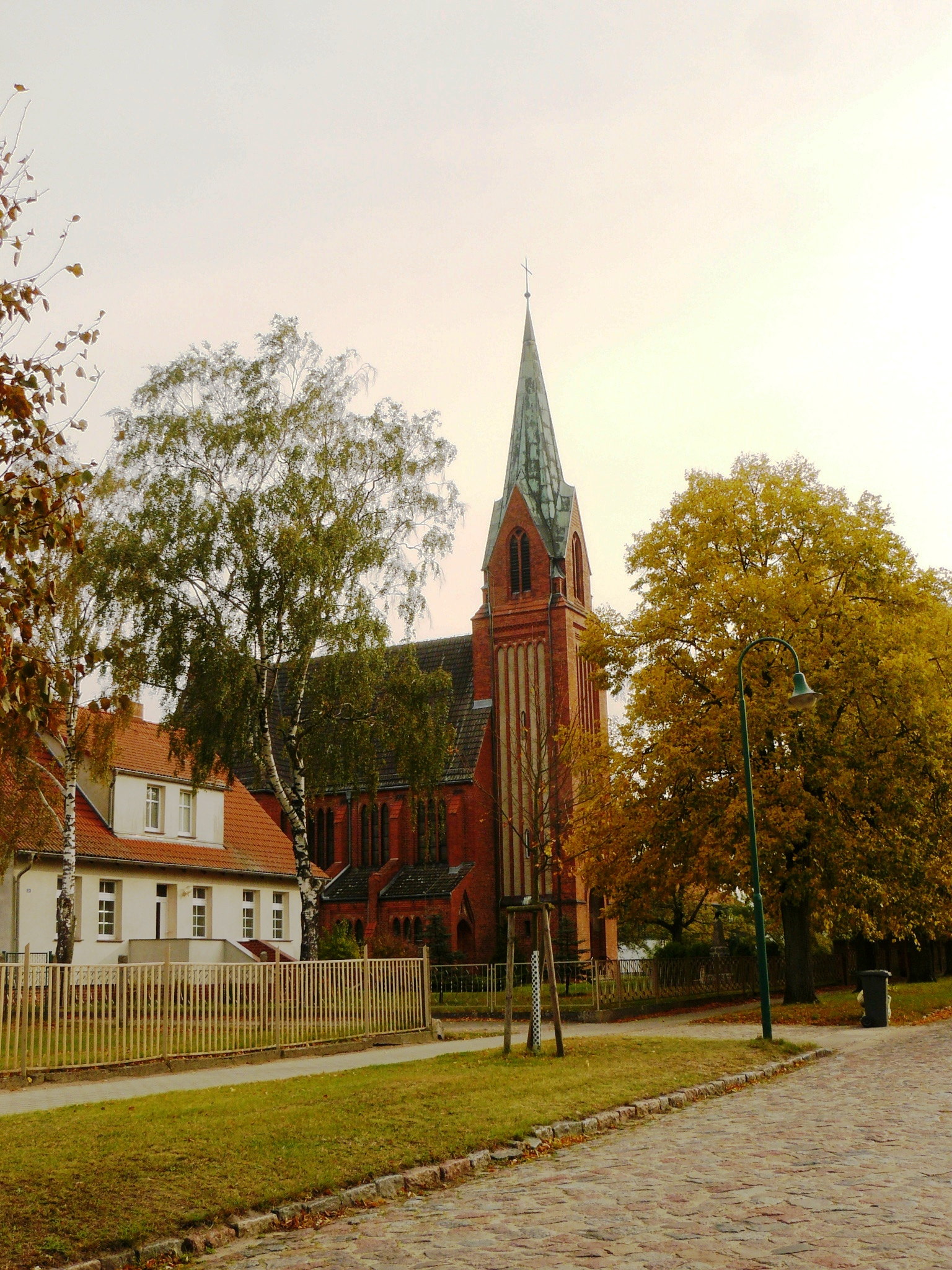 Die katholische Kirche Mariä Geburt, Kirchstr. 21 in Viereck (Vorpommern), ein 1911 erbauter unter Denkmalschutz stehender Backsteinbau (Blick von SW).